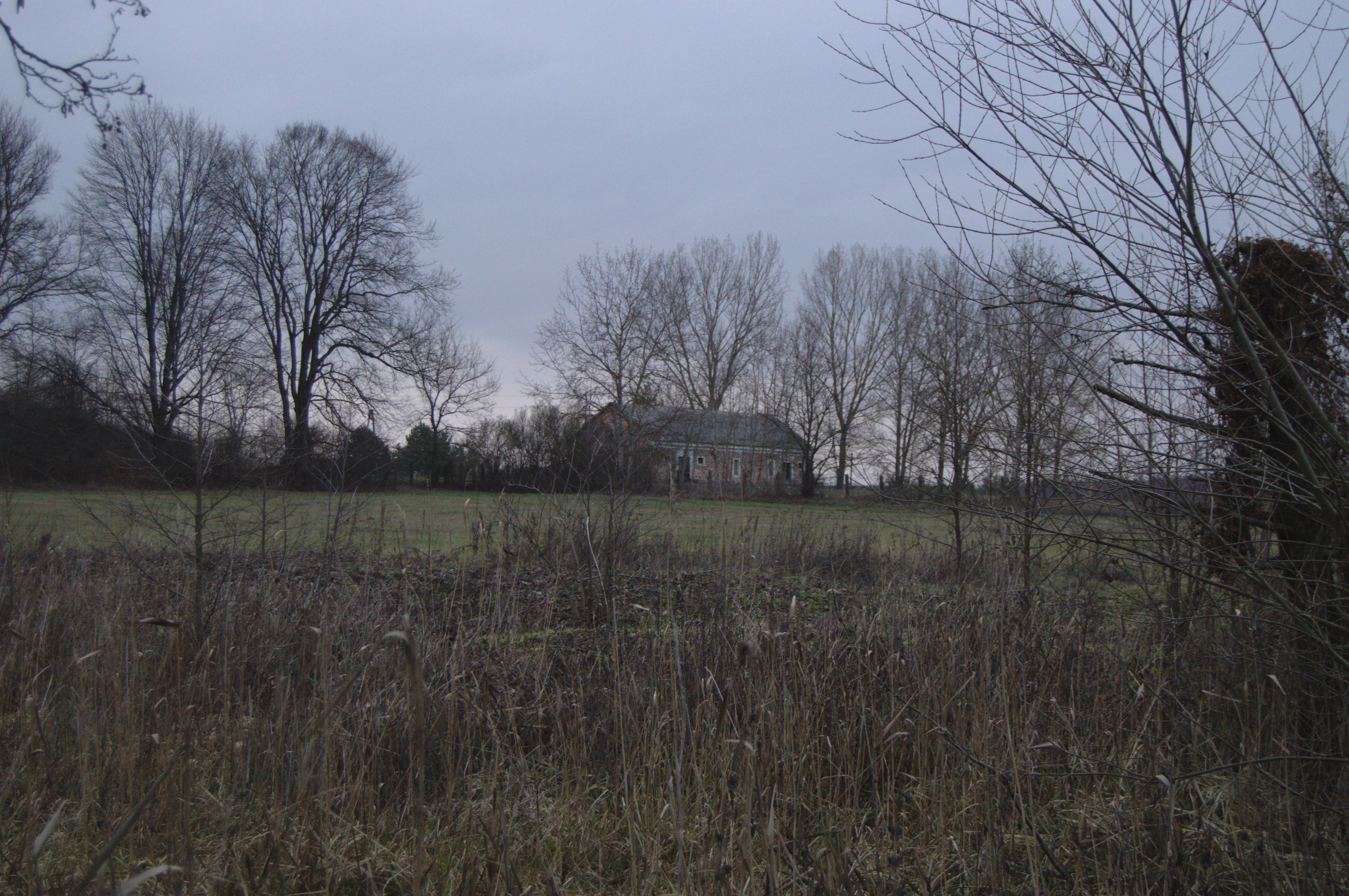 Fragment dawnego parku dworskiego w majątku Korzany, na drugim planie spichlerz dworski w Zajączkach, II poł. XIX w.